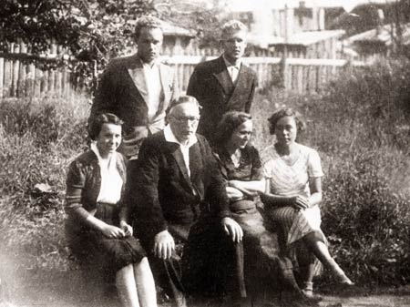 Я.Маўр у сямейным асяроддзі: Фёдар, Арсеній, Наталля, жонка Сцефаніда Аляксандраўна і Аляксандра